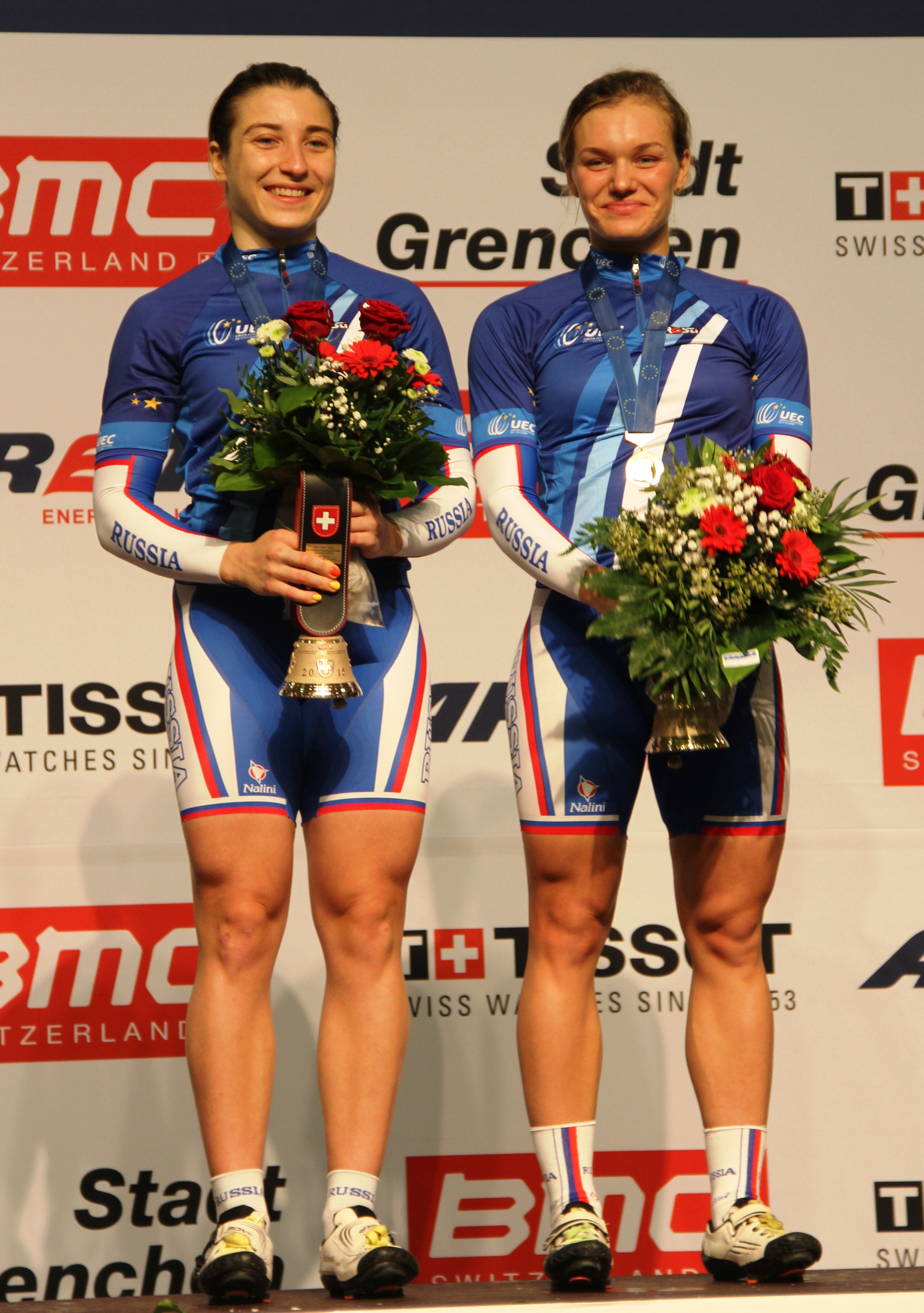 Daria Shmeleva (l.), Anastasiia Voynova, russische Radsportlerinnen, Europameisterinnen im Teamsprint 2015 The making of this document was supported by the Community-Budget of Wikimedia Germany.